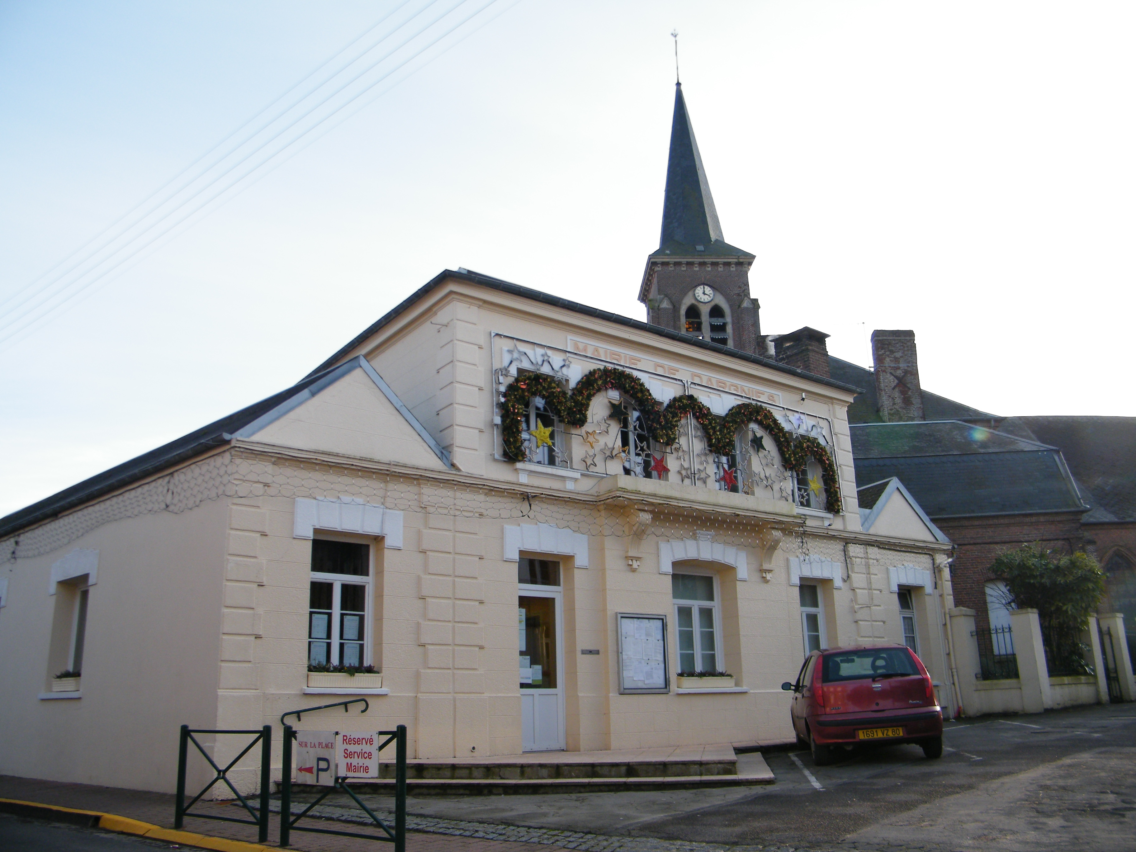 Devant l'église : la mairie de Dargnies.